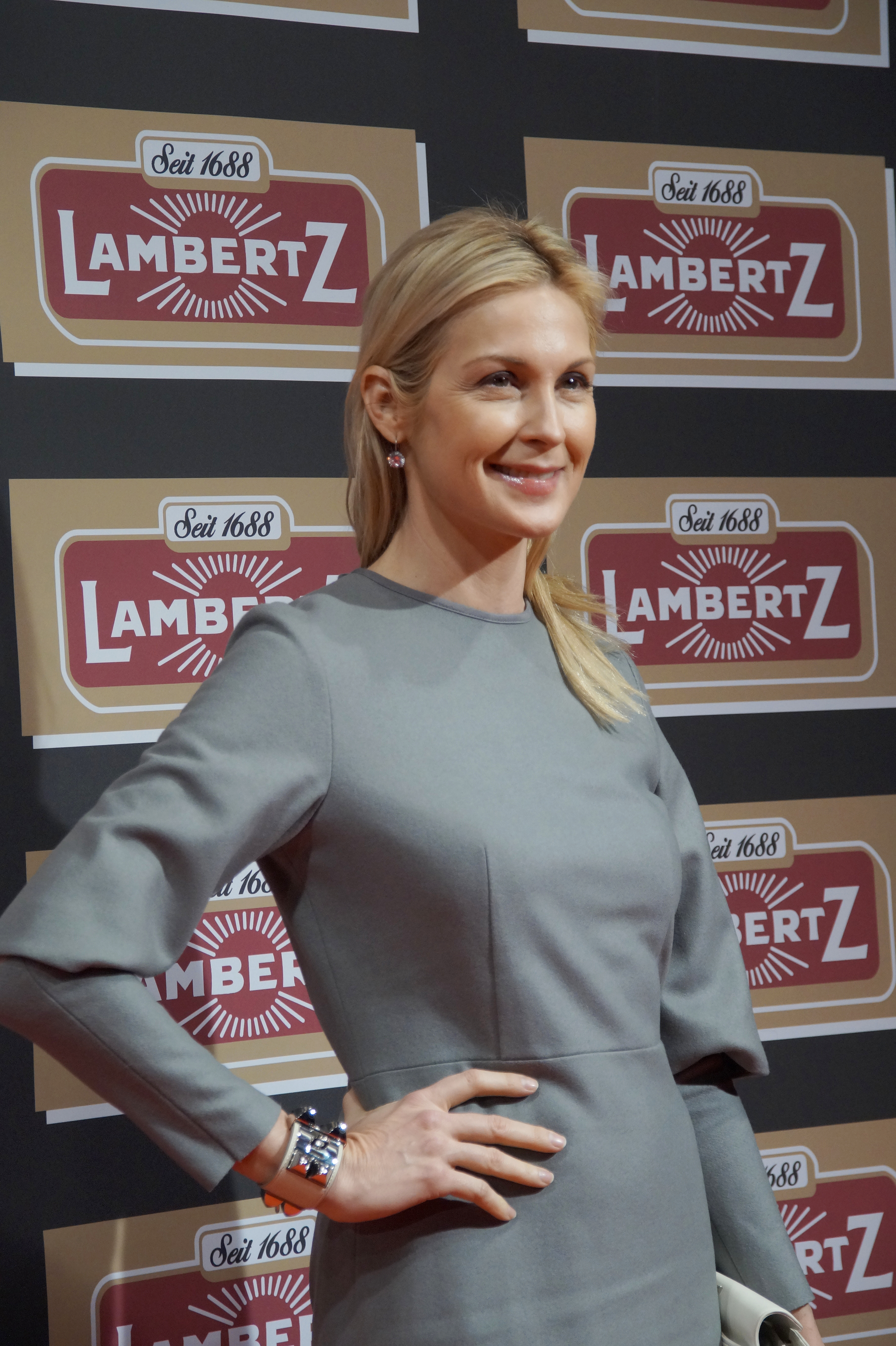 Kelly Rutherford bei der Lambertz Monday Night, im Februar 2016.